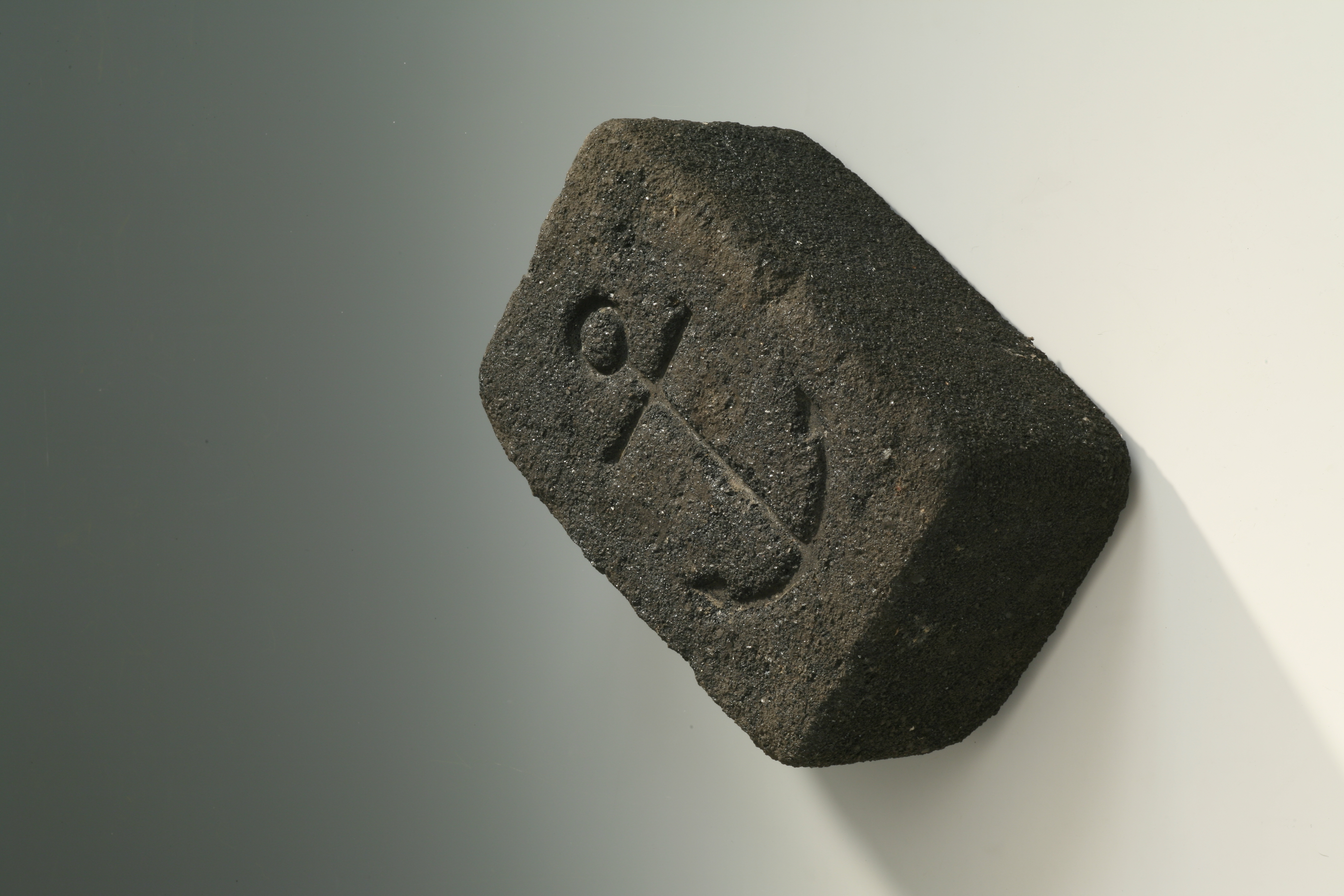 Briquette de charbon